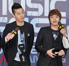 슈프림팀. 2011년 2월, MTV-DAUM 뮤직 페스트에서.